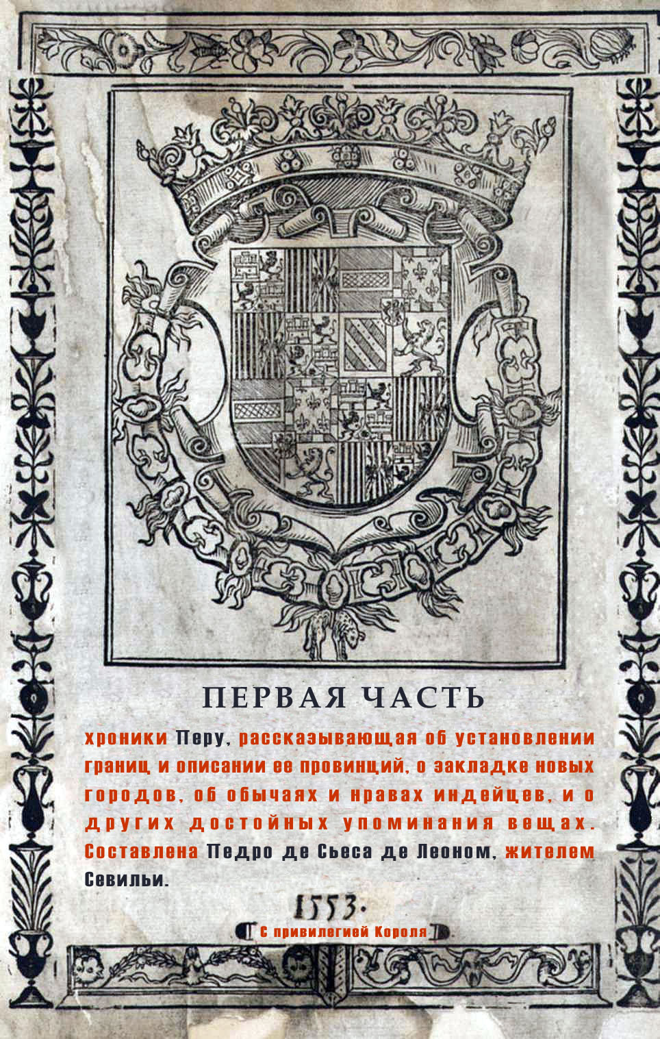 Титульный лист Первой части Хроники Перу, 1553 [2009]